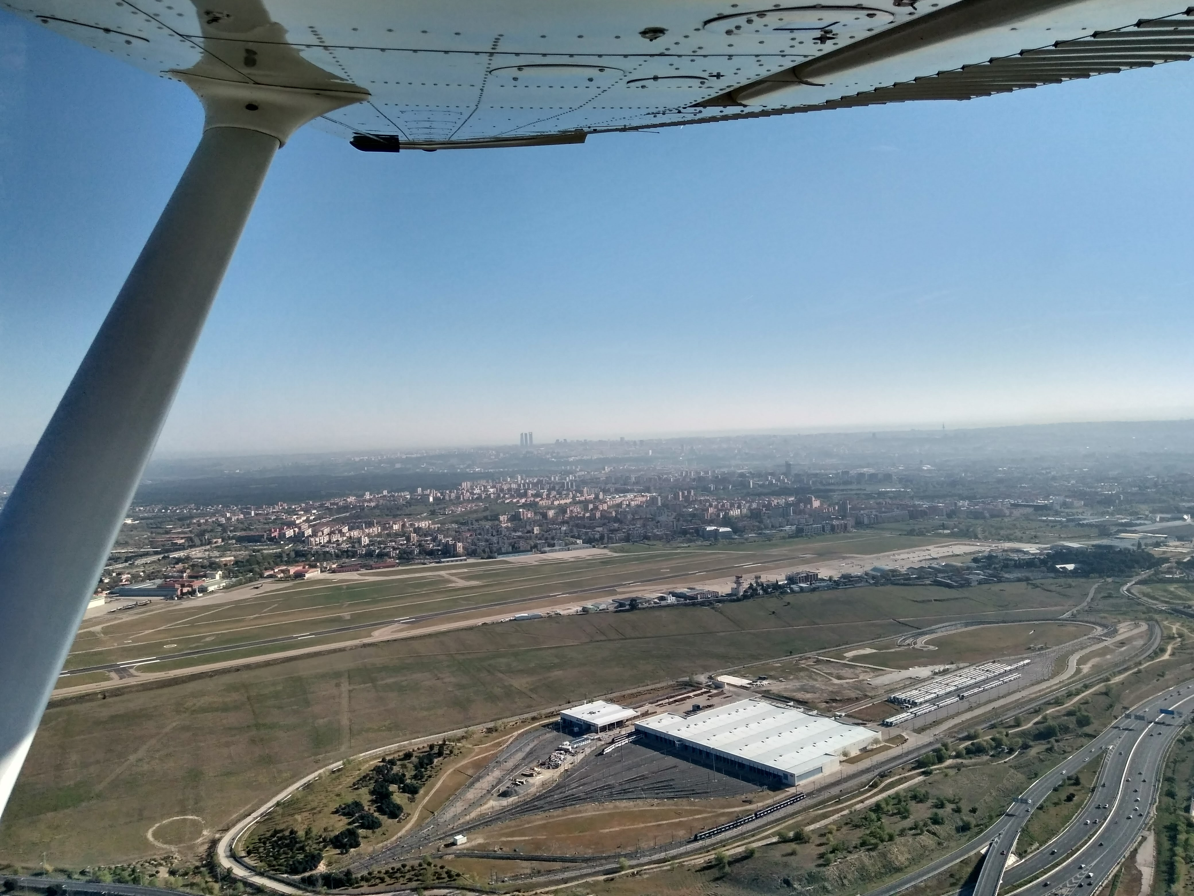 Vista aerea Aeropuerto Madrid-Cuatro Vientos desde el viento en cola derecha de la pista 09